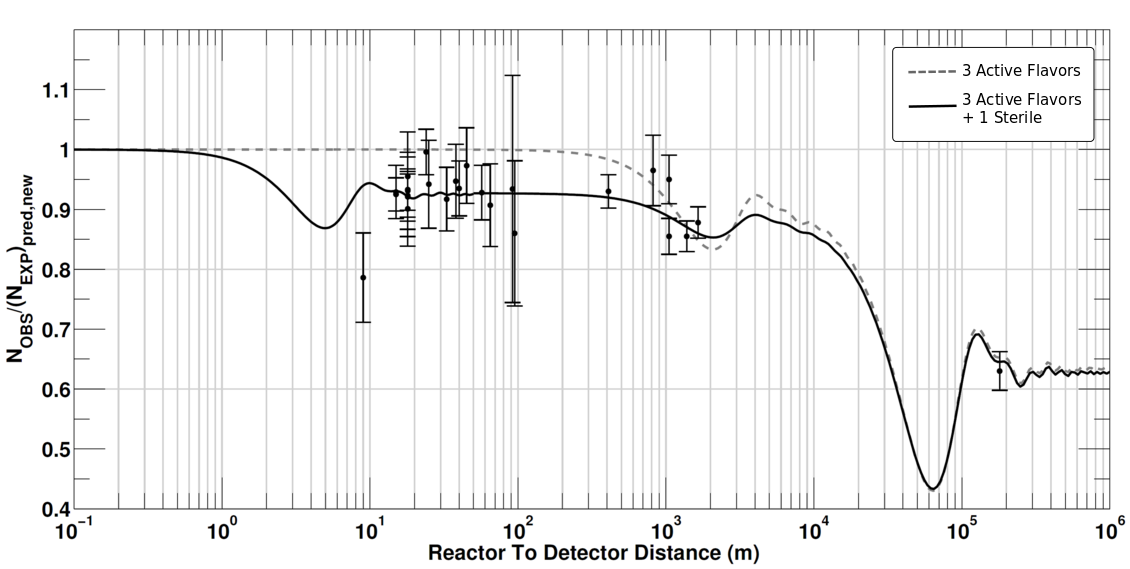 In verschiedenen Experimenten gemessene Überlebenswahrscheinlichkeit von Reaktor-Antielektron-Neutrinos plus die erwarteten Kurven im gängigen 3-Neutrino Oszillationsschema (gestrichelt) und unter der Annahme eines 4. sterilen Neutrinos (durchgezogene Linie)